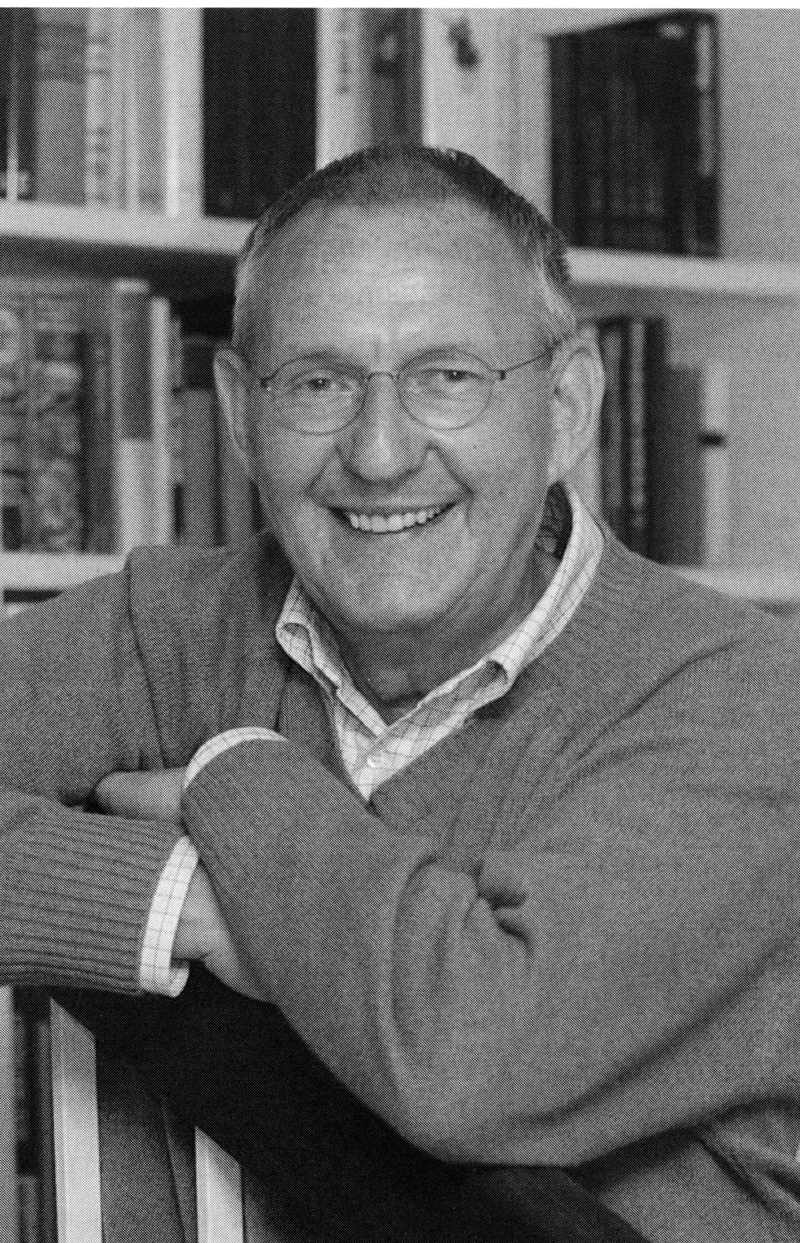 Kreft, Dieter